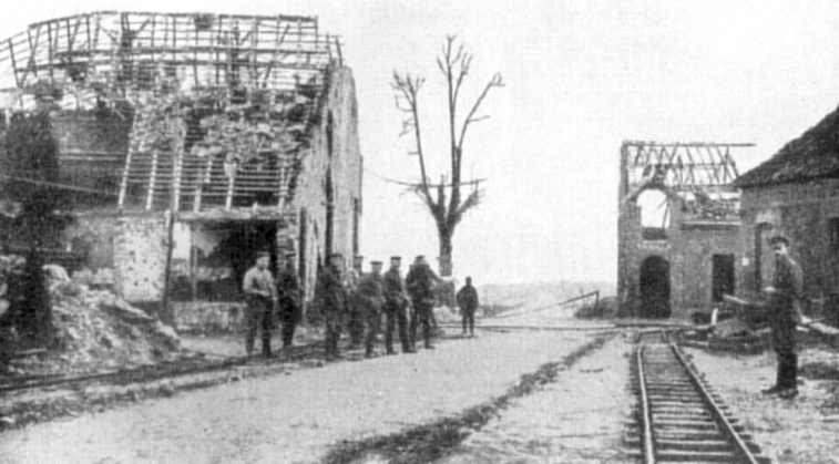 Hauptstraße in Wijtschate